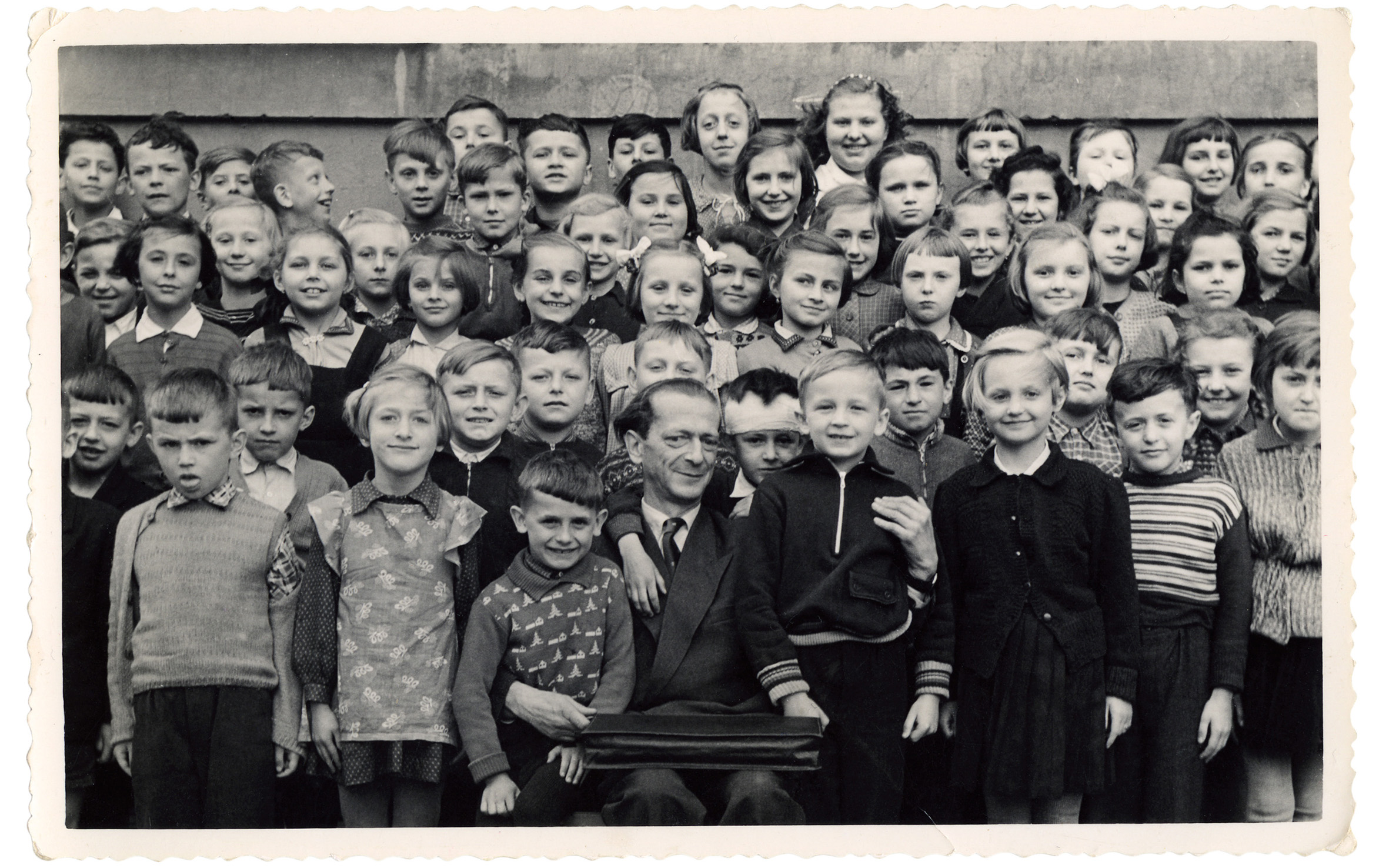 Чеслав Янчарський з читачами